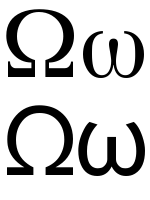 greek letter omega